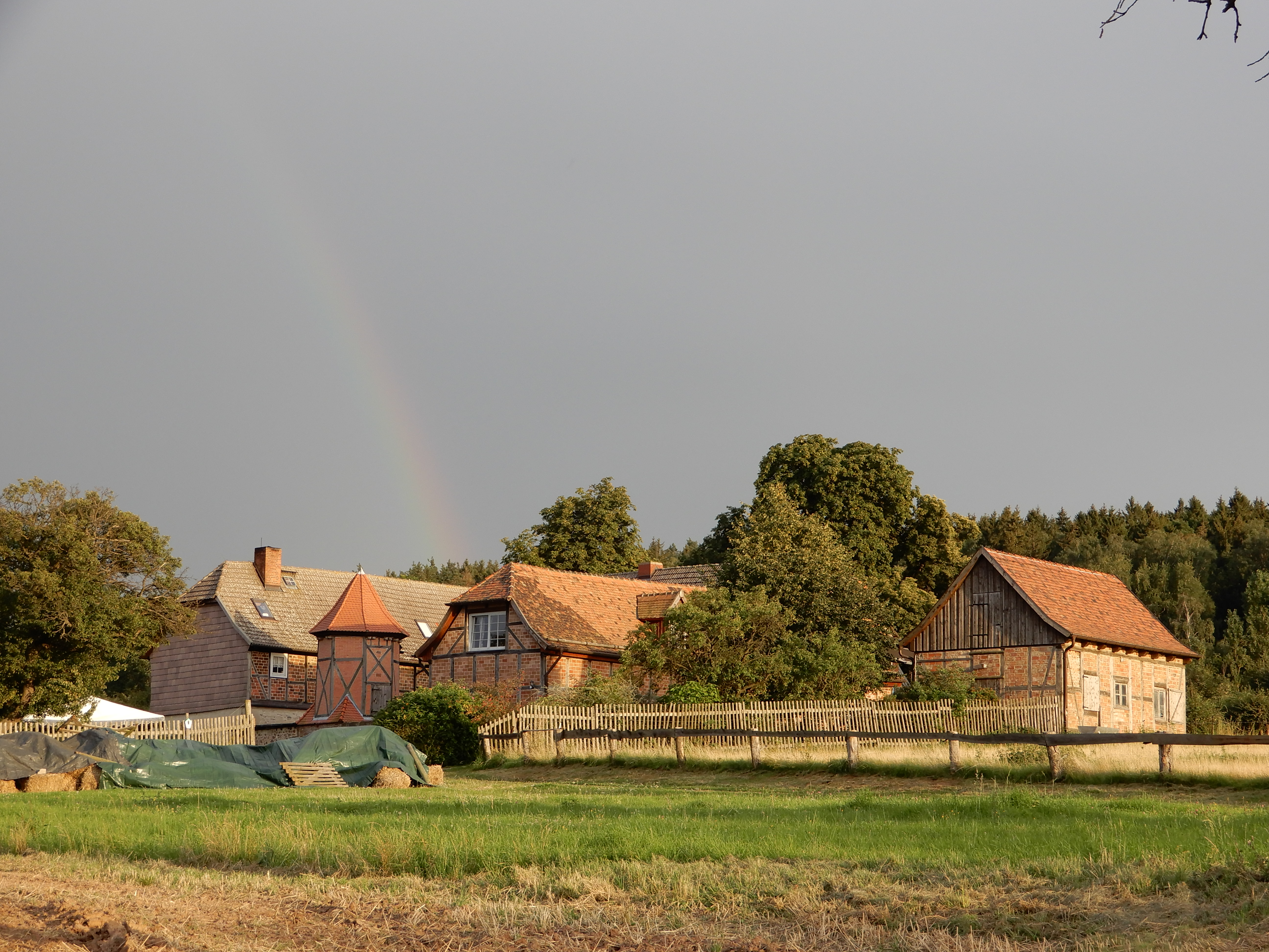 Forsthaus Friedrichshohenberg bei Ermsleben